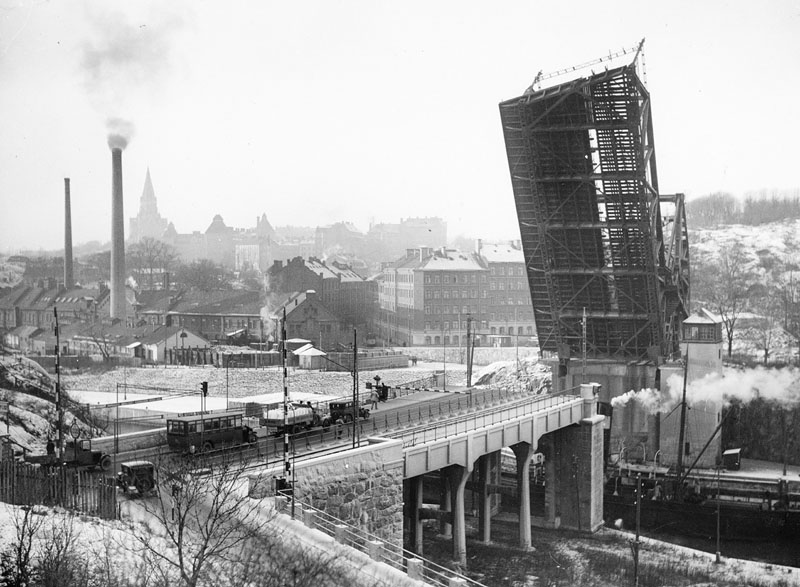 Danviksbron. Broöppning för passerande båt i Danvikskanalen